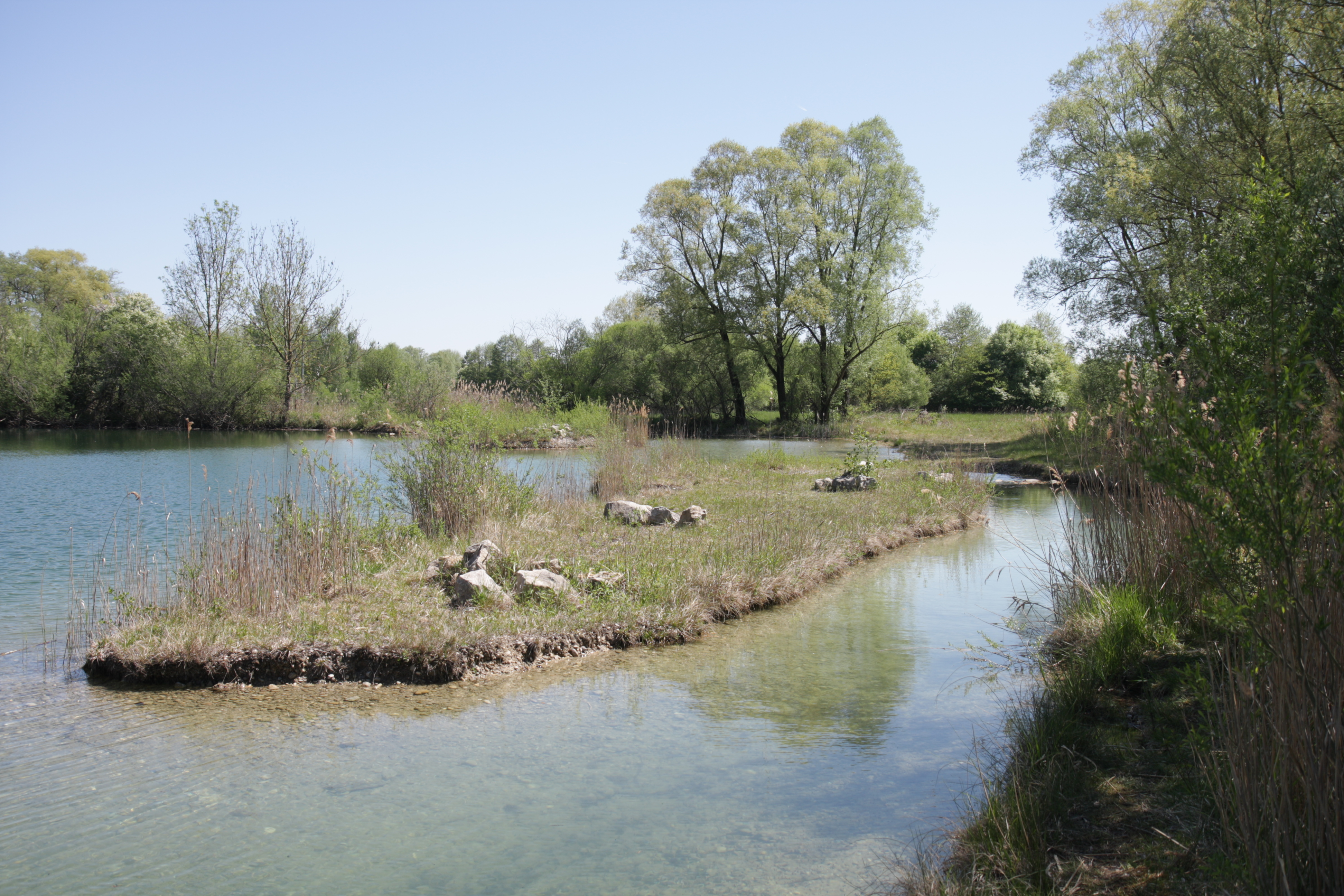 Teich im FFH-Gebiet "NSG südlich der Ismaninger Fischteiche"; Blickrichtung Ost